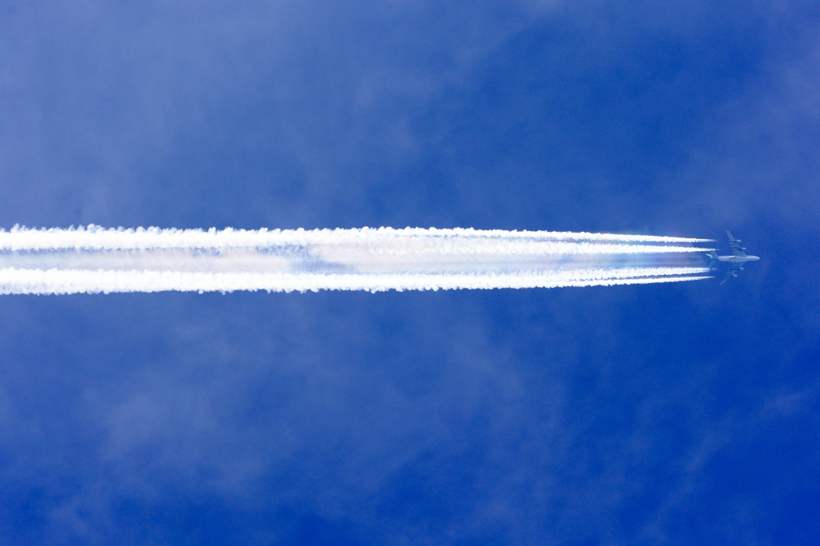 飛行機雲を発生させるKorean AirのA380-800 飛行機雲の一部が彩雲となっている